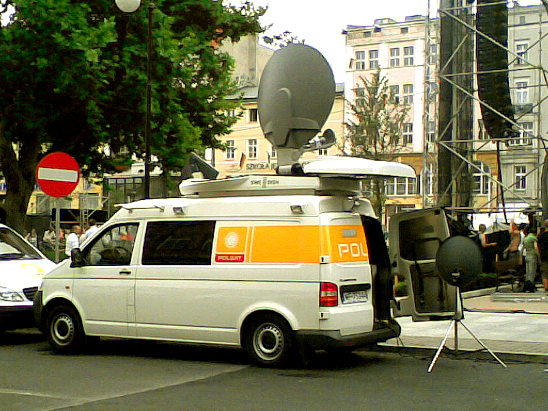 Wóz reporterski telewizji Polsat w Poznaniu. Volkswagen T5.